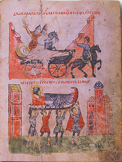 Tale of Boris and Gleb Перевозка мощей